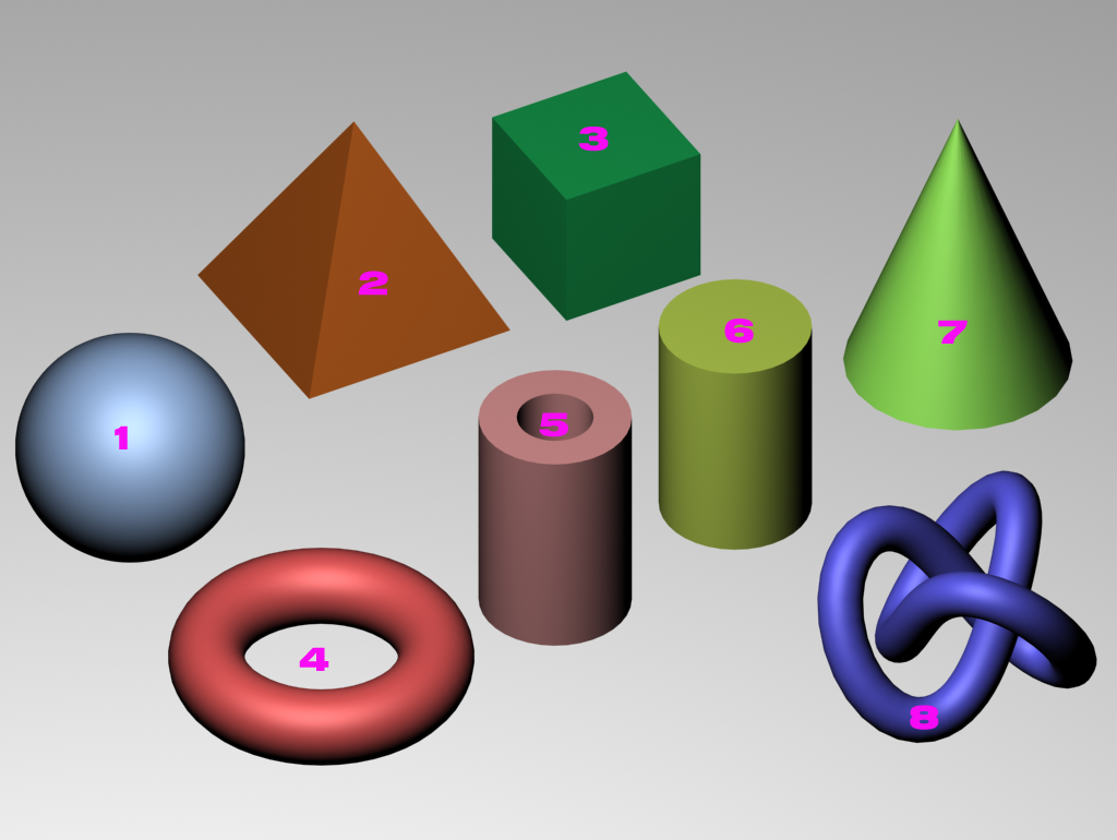 ജ്യാമിതീയ ഘനരൂപങ്ങൾ -1.ഗോളം, 2.പിരമിഡ്, 3.ക്യൂബ്‌, 4.റ്റോറസ്, 5.ട്യൂബ്, 6.സിലിണ്ടർ‌, 7.കോൺ അഥവാ കൂമ്പ്, 8.റ്റോറസ് നോട്ട് (torus knot)- റ്റോറസ് കെട്ട്